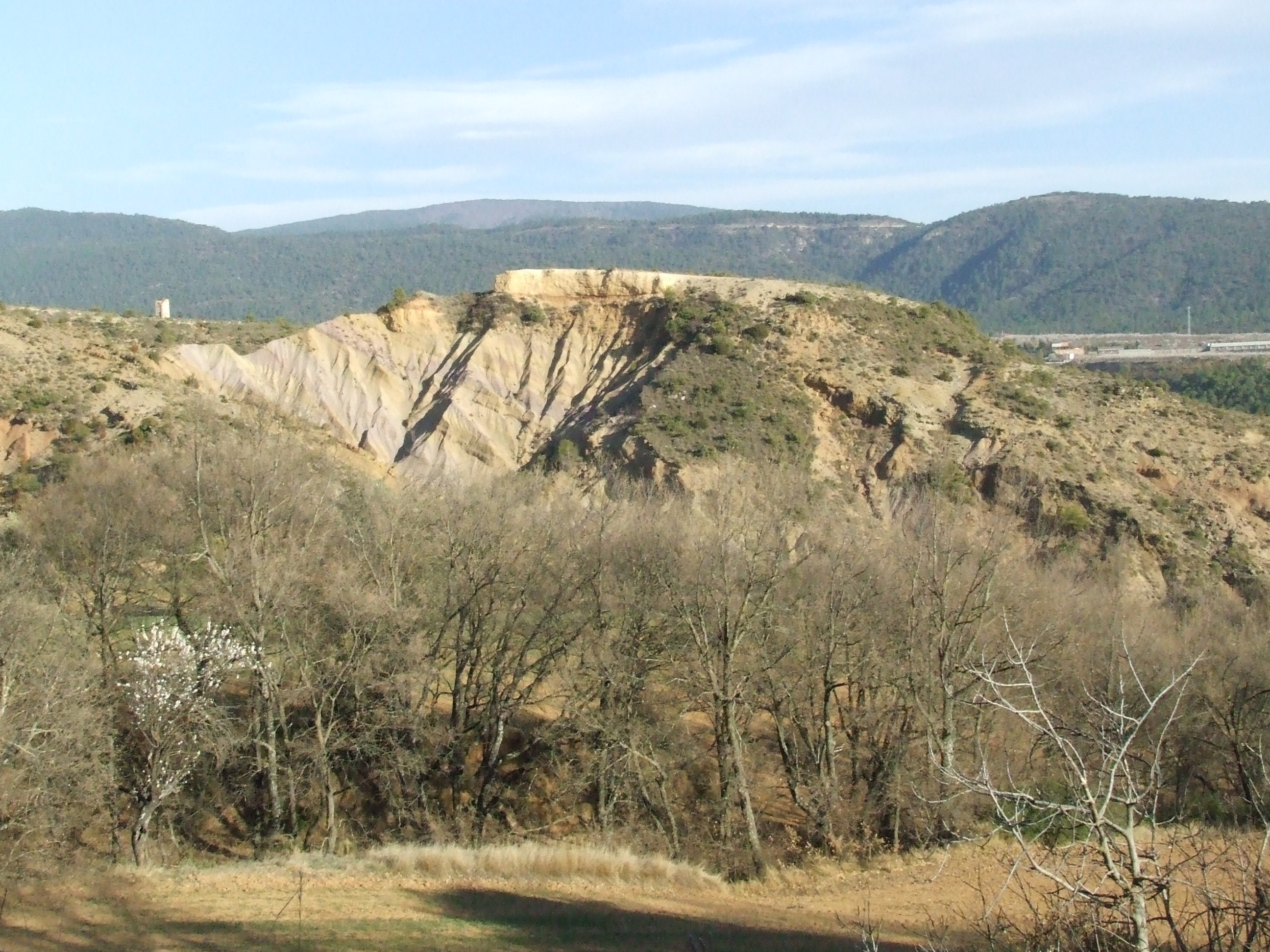 El Serrat del Corb (Abella de la Conca, Pallars Jussà)